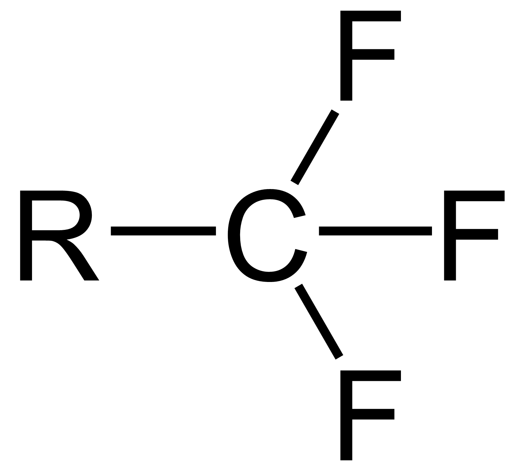 CF3 group